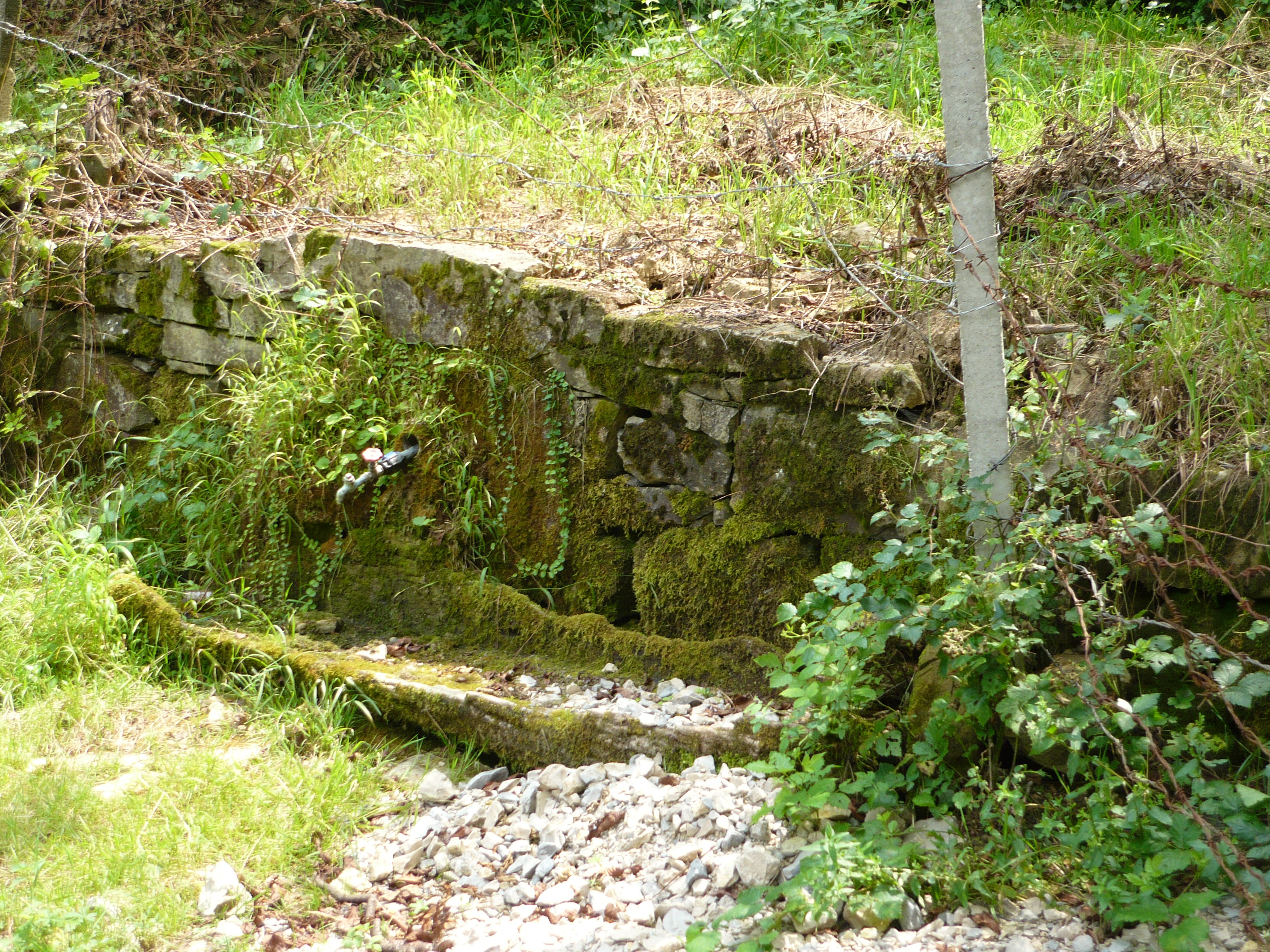 Чешма